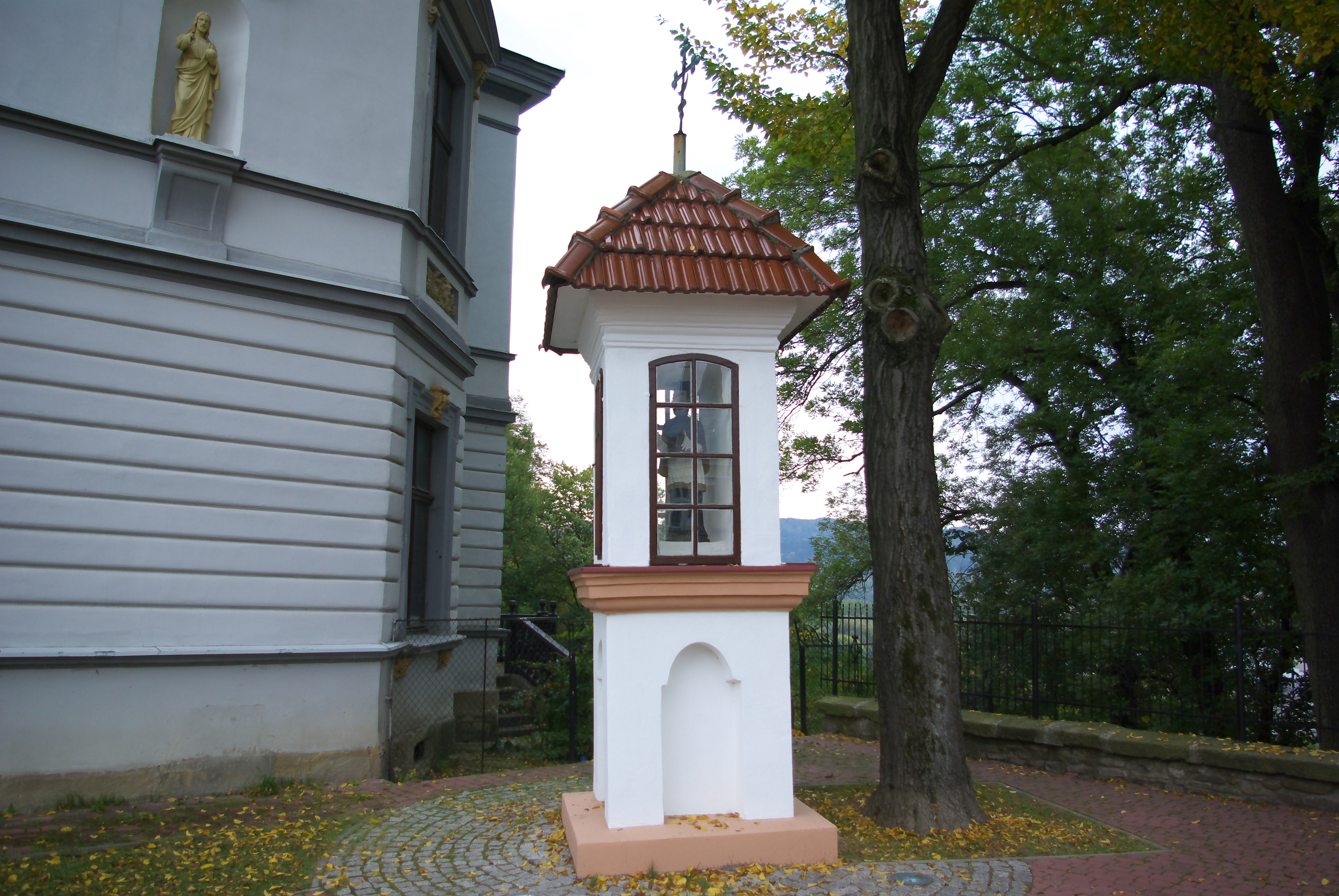 Kapliczka św. Jana Nepomucena na placu św. Jana w Sanoku. Odnowiona w 2012 roku